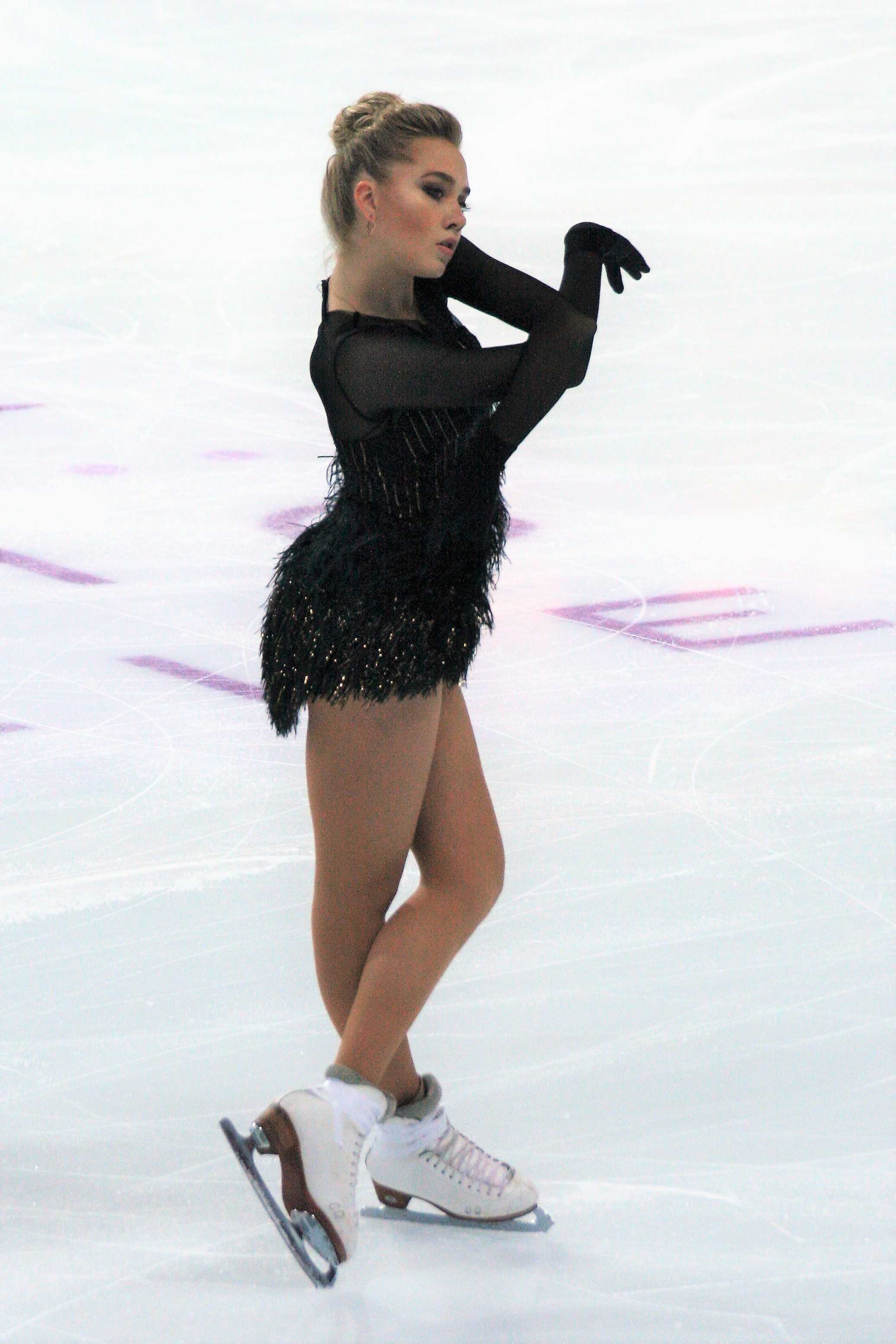 Елена Радионова (Россия) на финале Гран-при по фигурному катанию 2016-2017